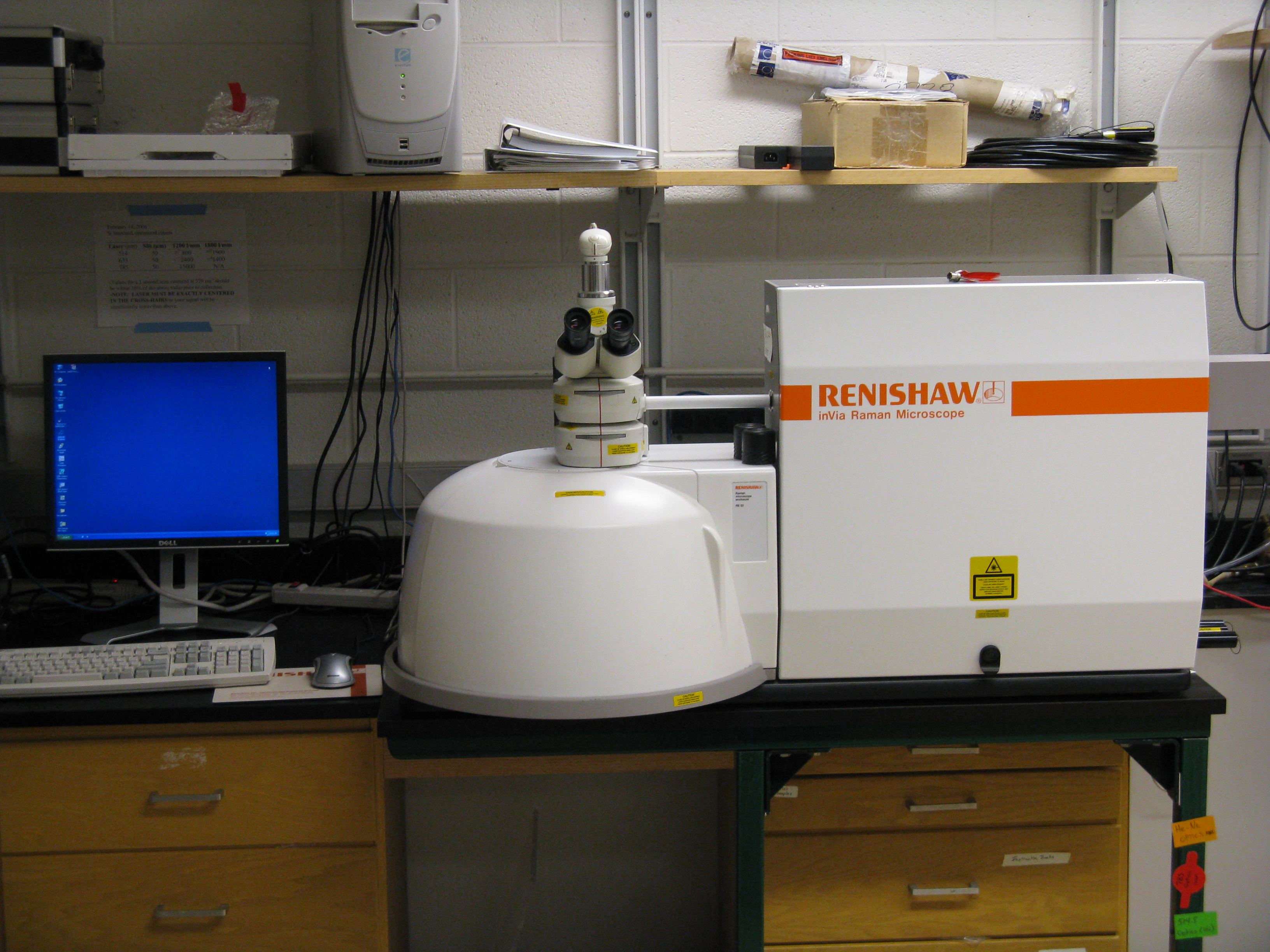 inVia Raman microscope